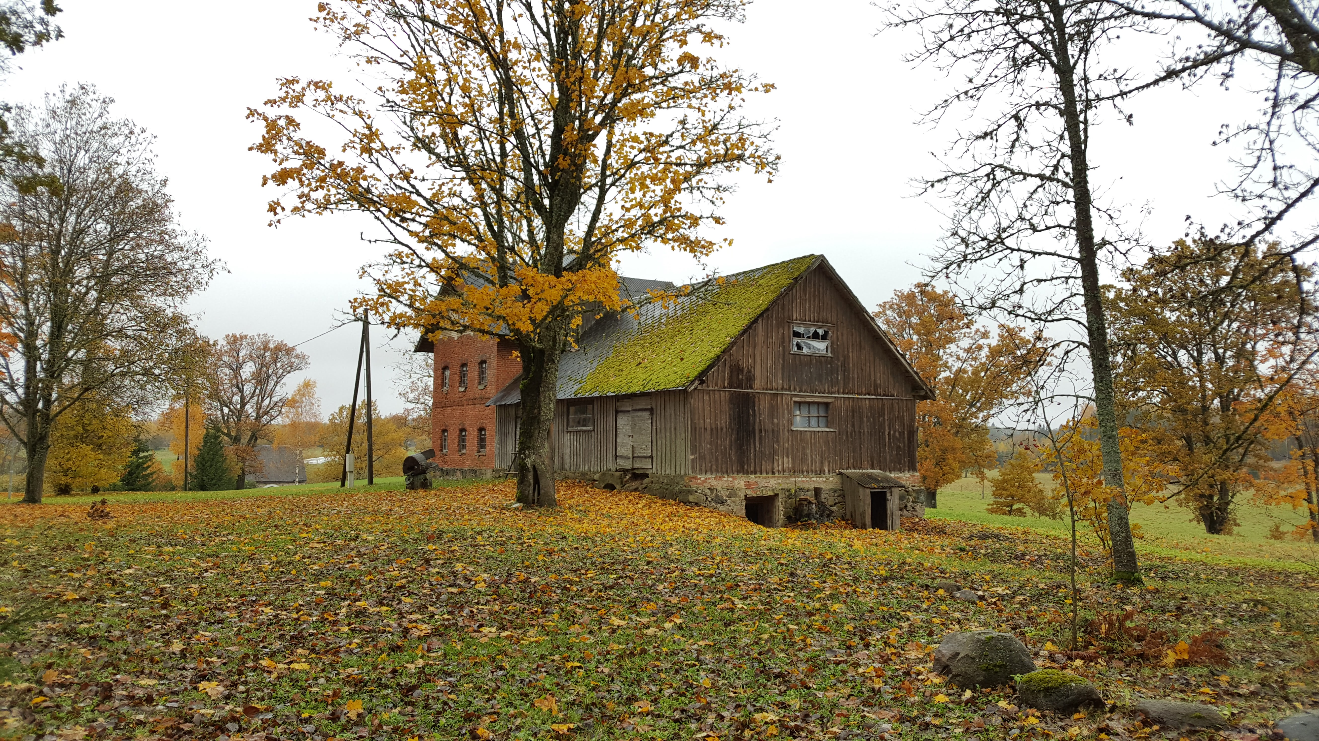 Kaive mõisa kõrvalhoone 2017. aastal.